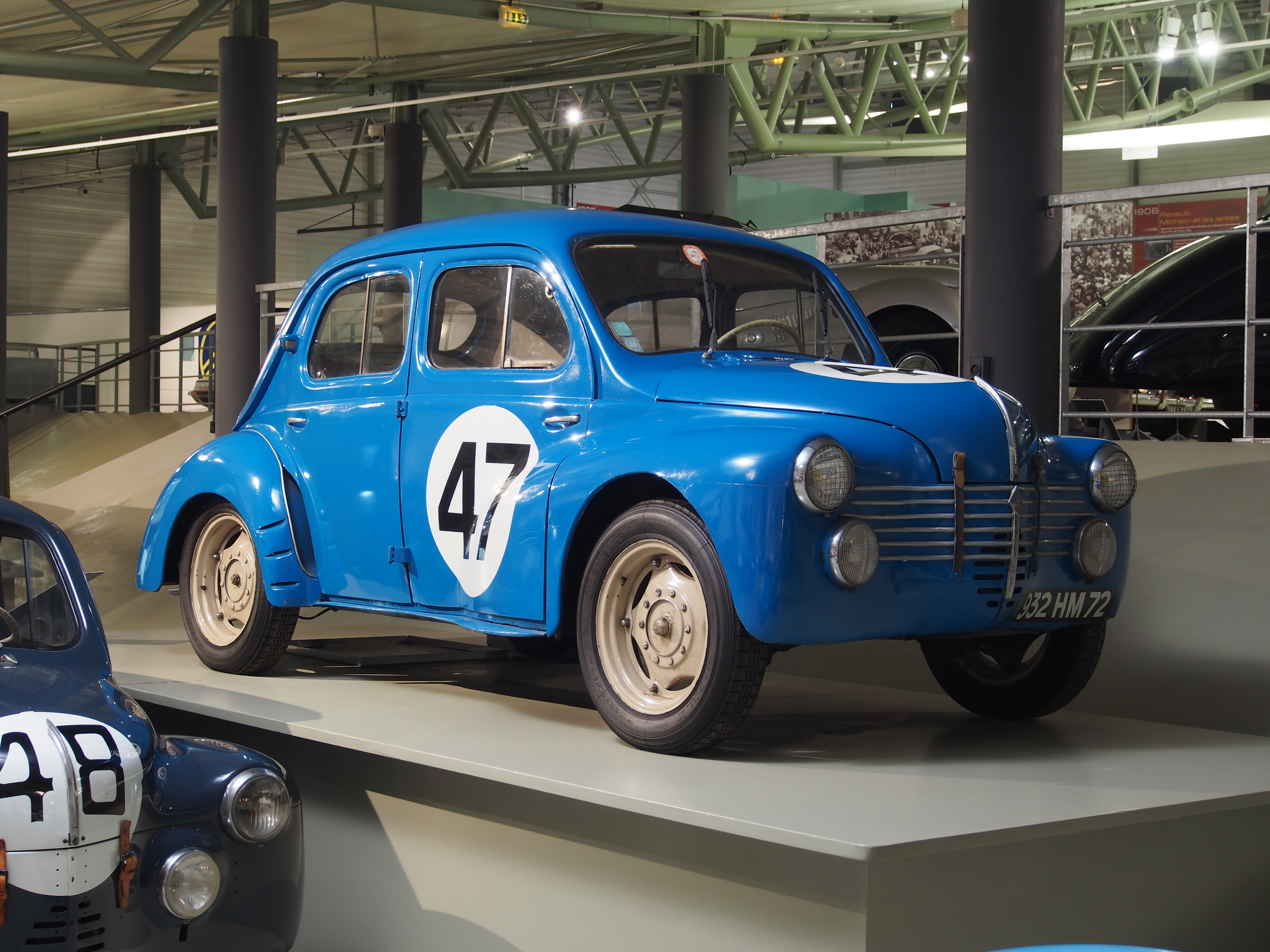 Photographed at Musée des 24 Heures du Mans, France.